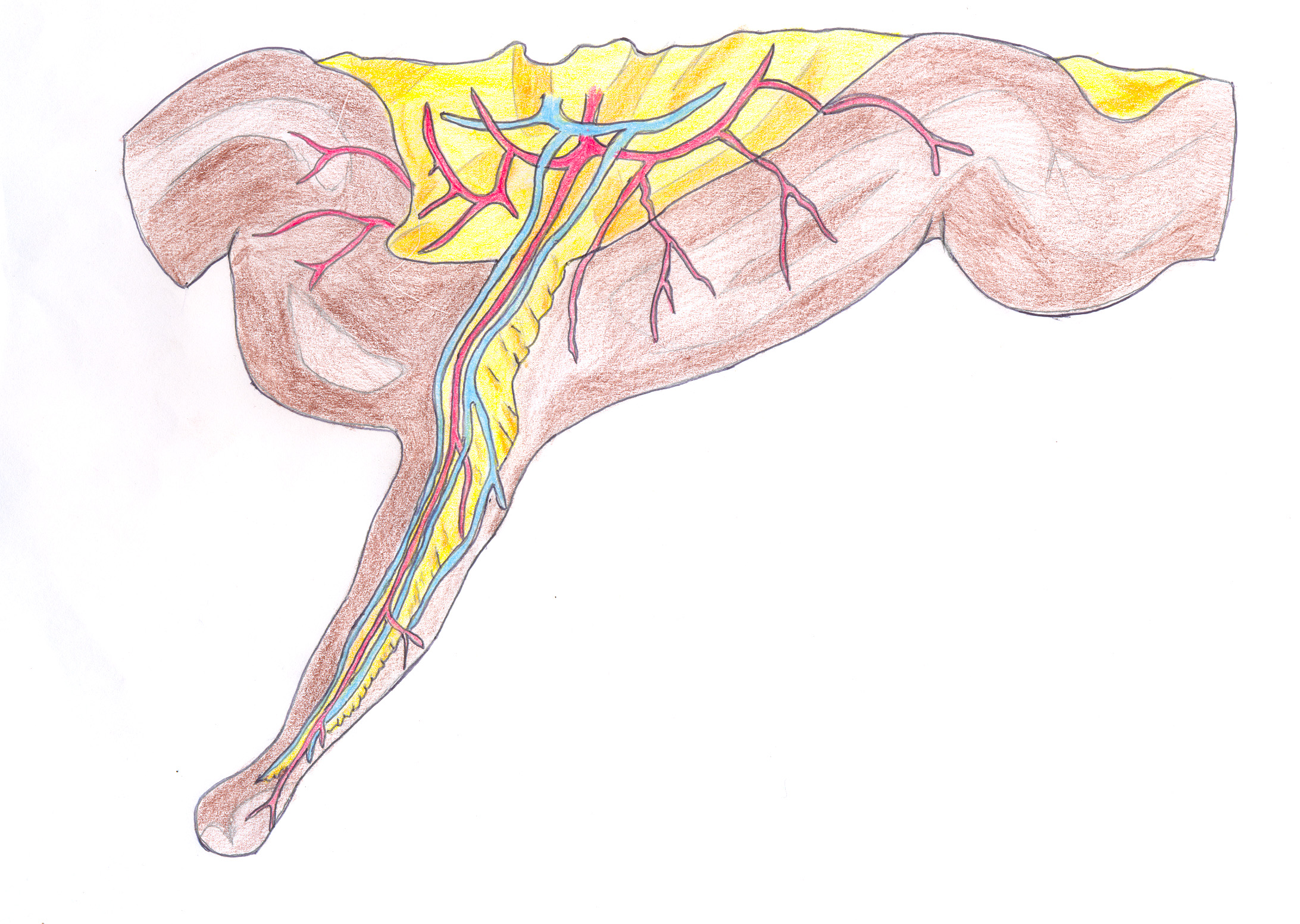 Représentation artistique du diverticule de Meckel sur une portion d'intestin grêle. Auteur : Raziel 26 mai 2006 à 15:45 (CEST) Date de création : 26/05/06